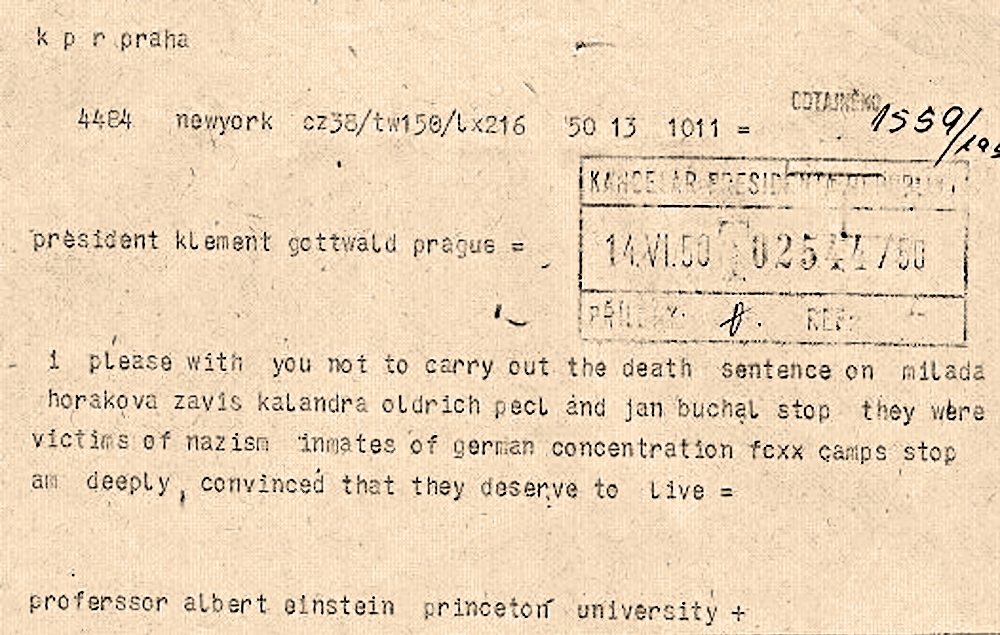 Einstein apeloval tímto telegramem ve věci hrdelních trestů vůči Horákové na prezidenta Gottwalda.